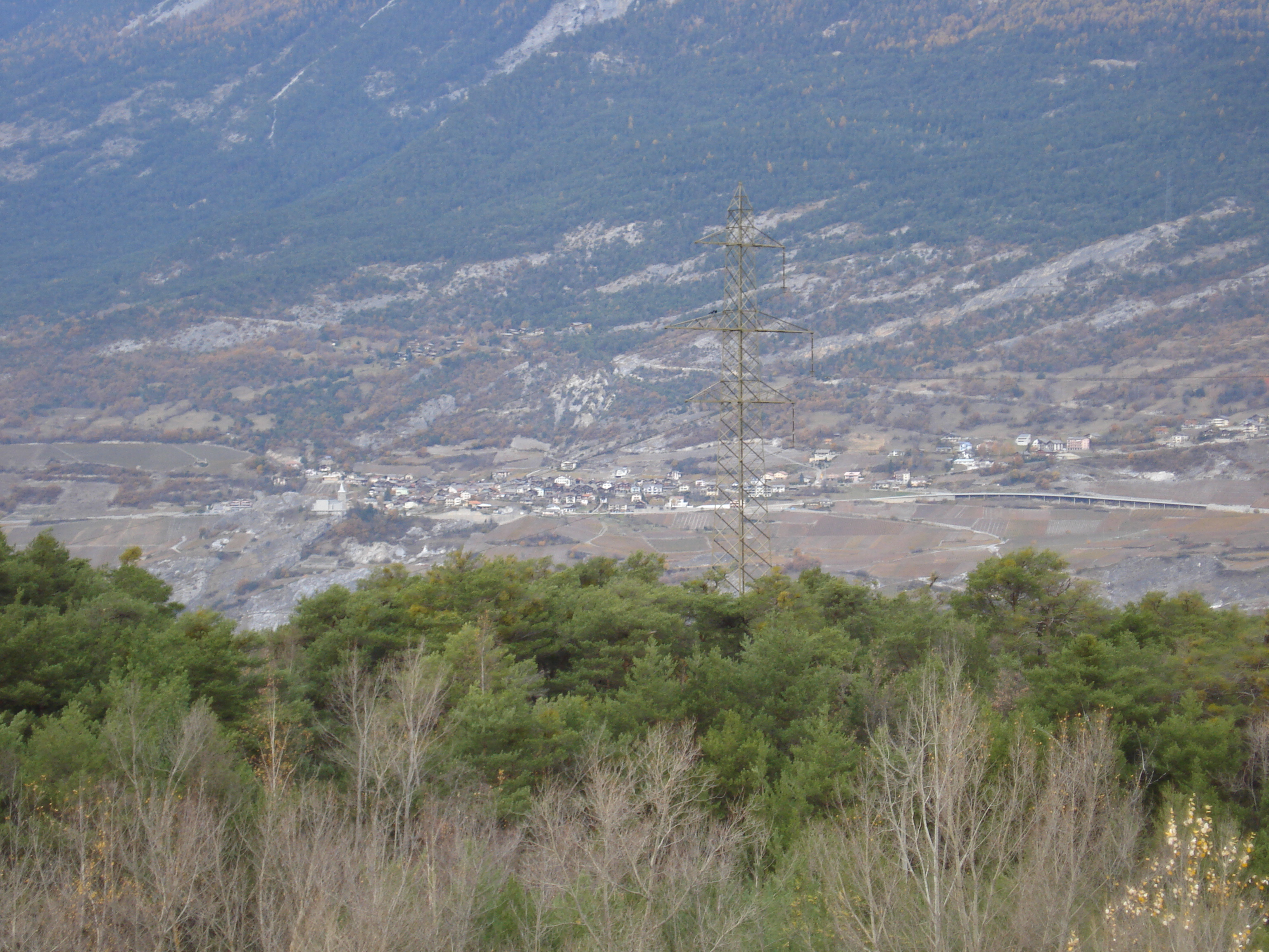 Vue sur Varen / Varonne de l'autre côté du Valais